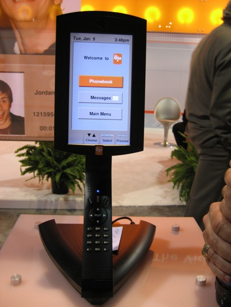 Das KabelWelt Ojo Videophone 900